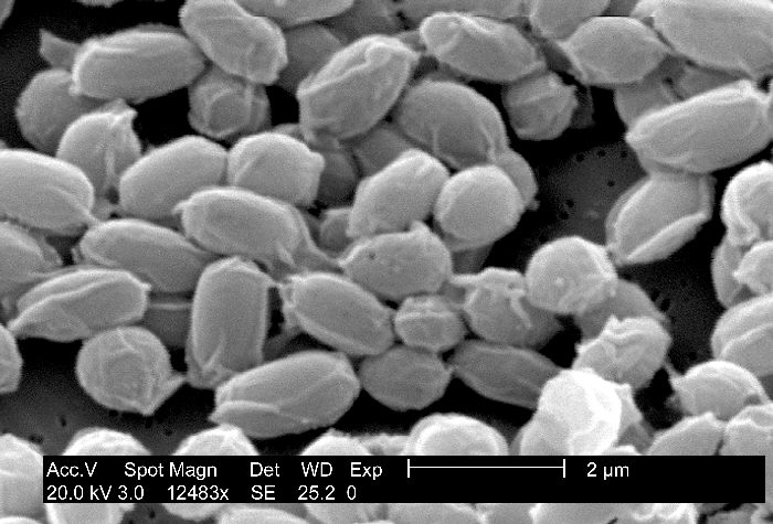 Sporen von Bacillus anthracis im Raster-Scanning-Mikroskop